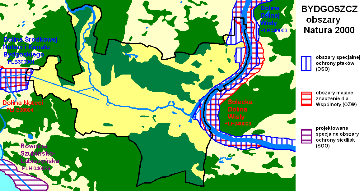 Obszary sieci Natura 2000 w okolicy Bydgoszczy na podstawie geoportalu RDOŚ w Bydgoszczy